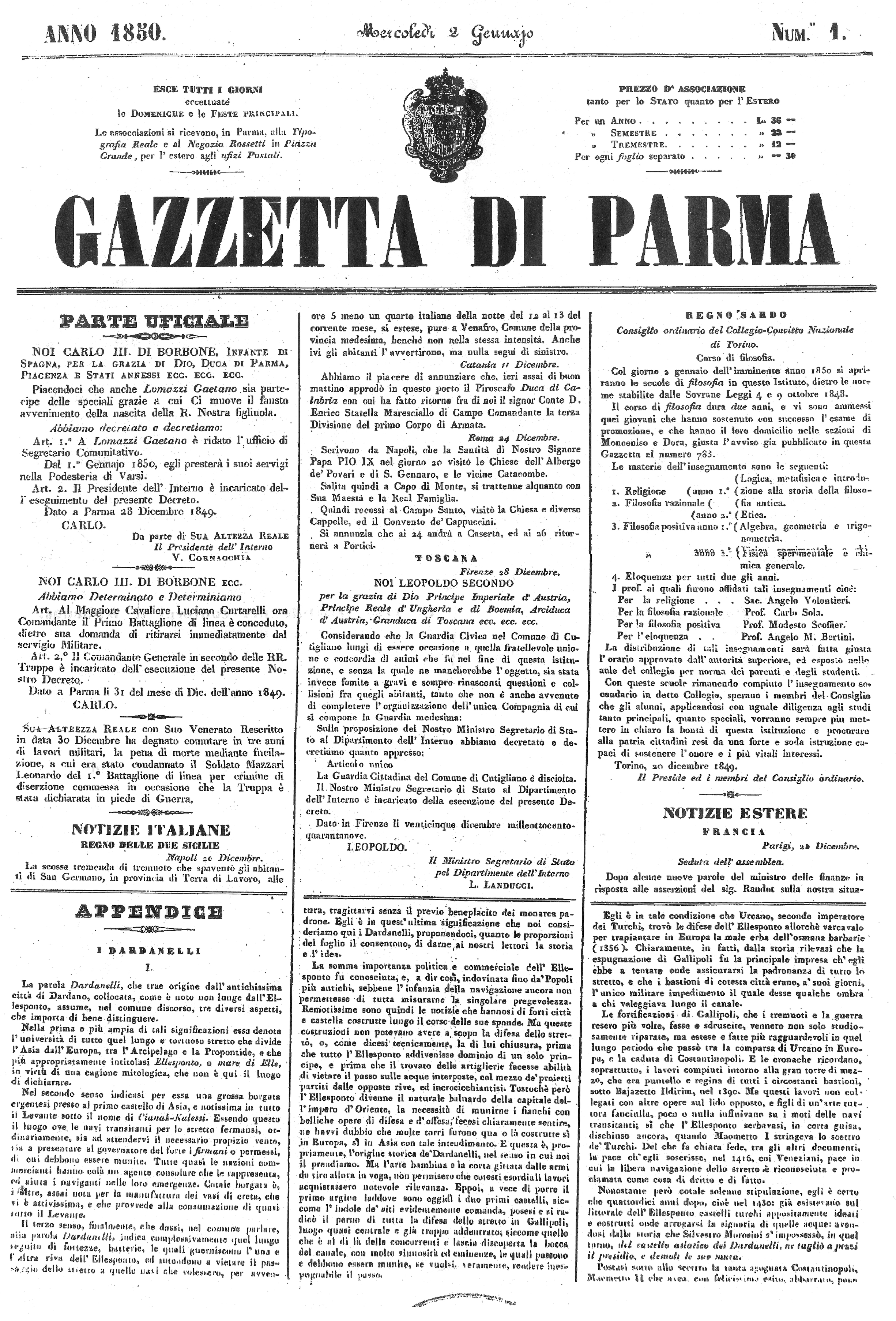 Édition de la Gazzetta di Parma en 1850, l'article mentionne duché de Parme, de Plaisance et des États annexes